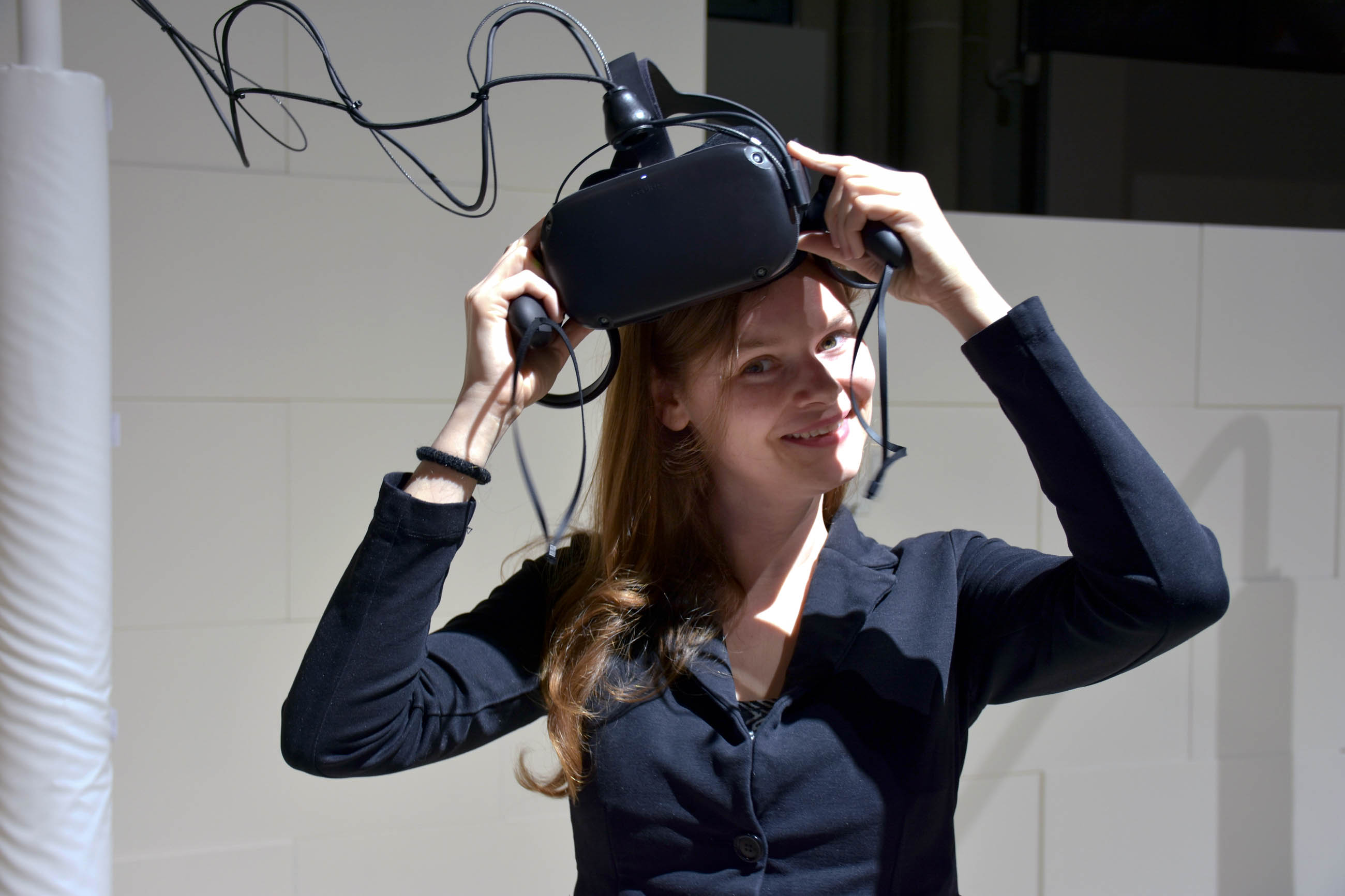 Entwicklerin Philomena Schwab besucht 2020 die Ausstellung «Games» im Landesmuseum Zürich.